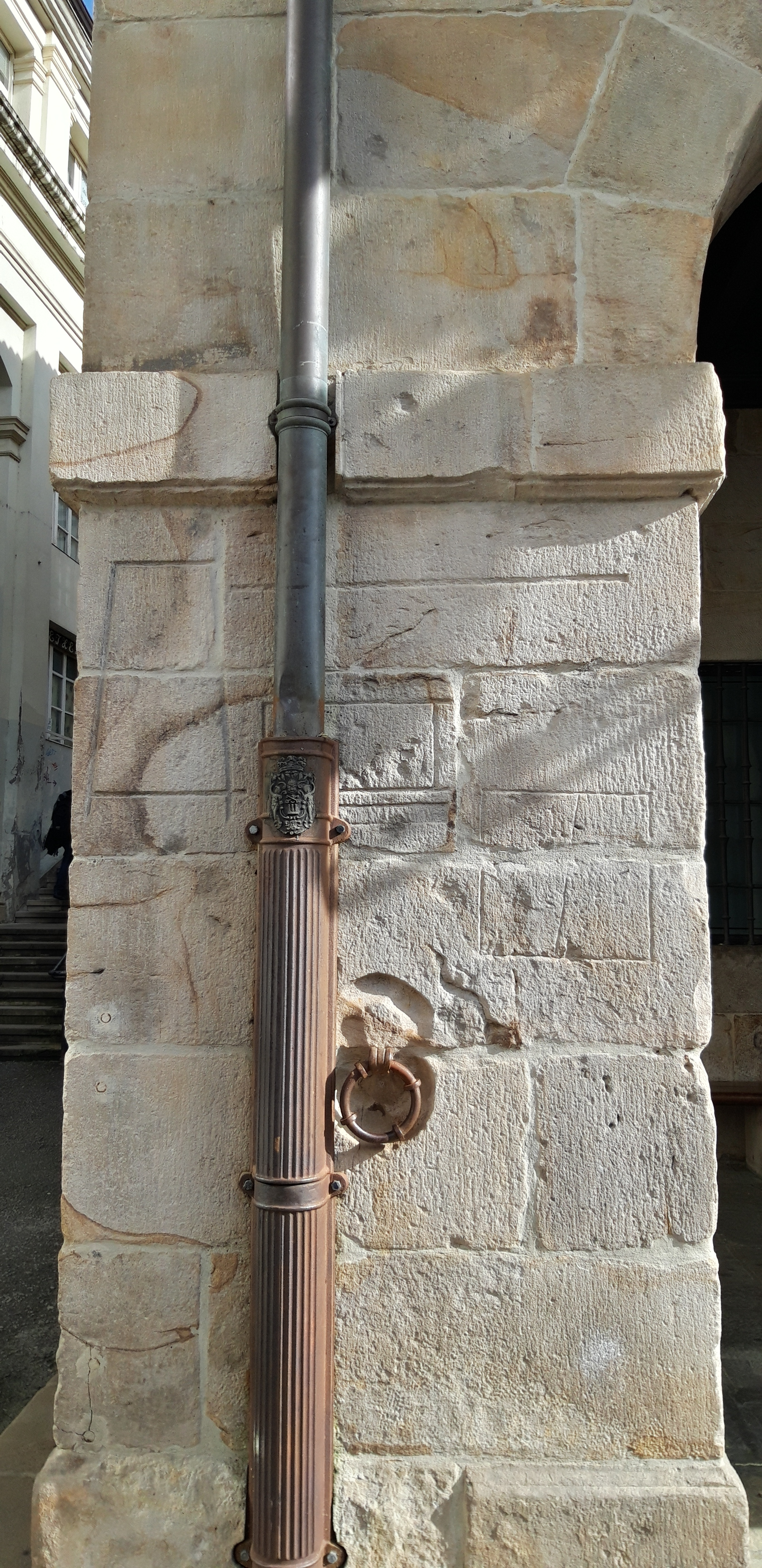 Bergarako Udaletxeko arkupetako zutabea eskuineko izkinan. Anega bat eta beste neurri motak neurtzeko irudiak tailatuta daude harlanduetan.